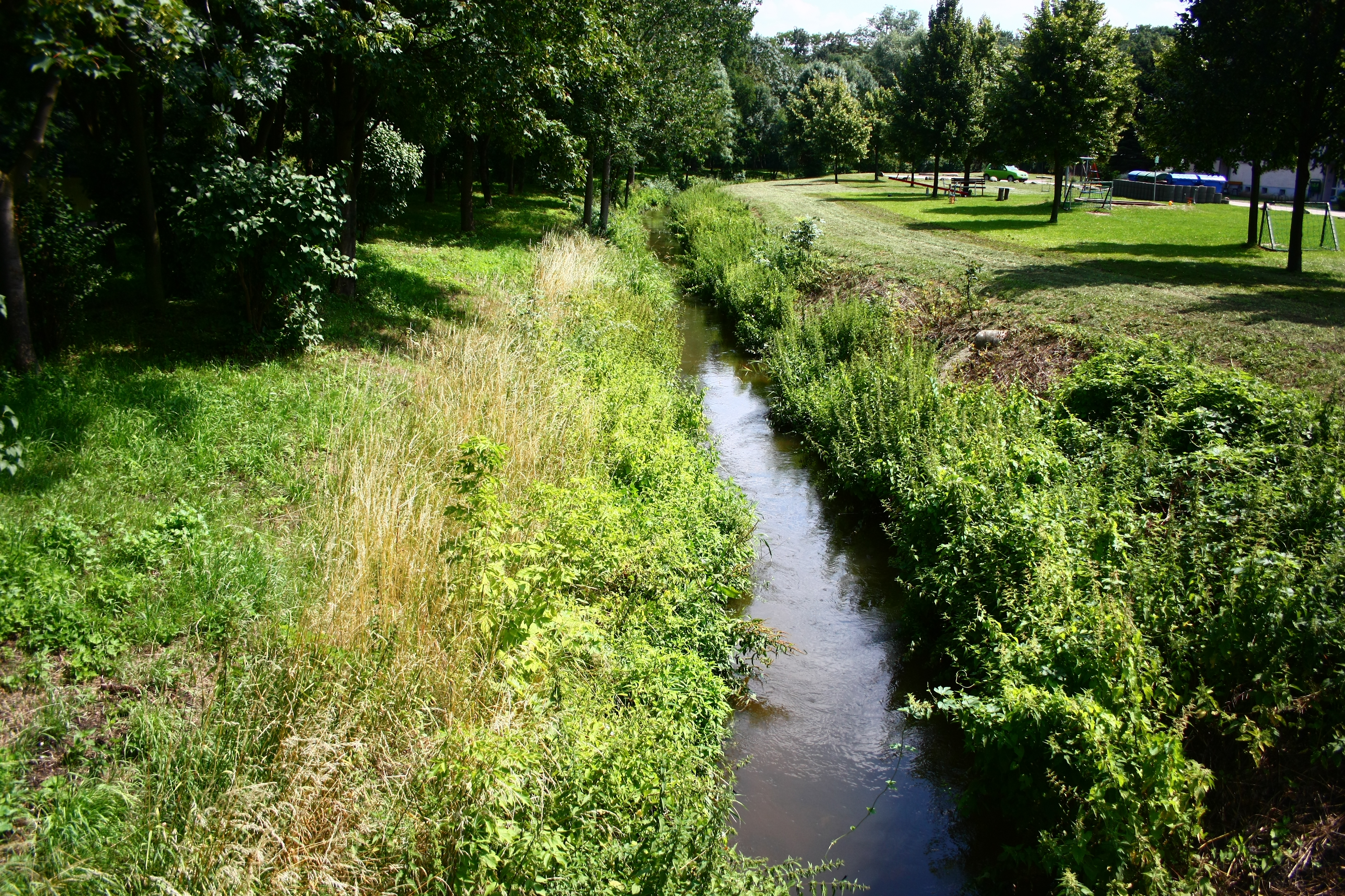 der Strengbach in Quetzdölsdorf am Teich